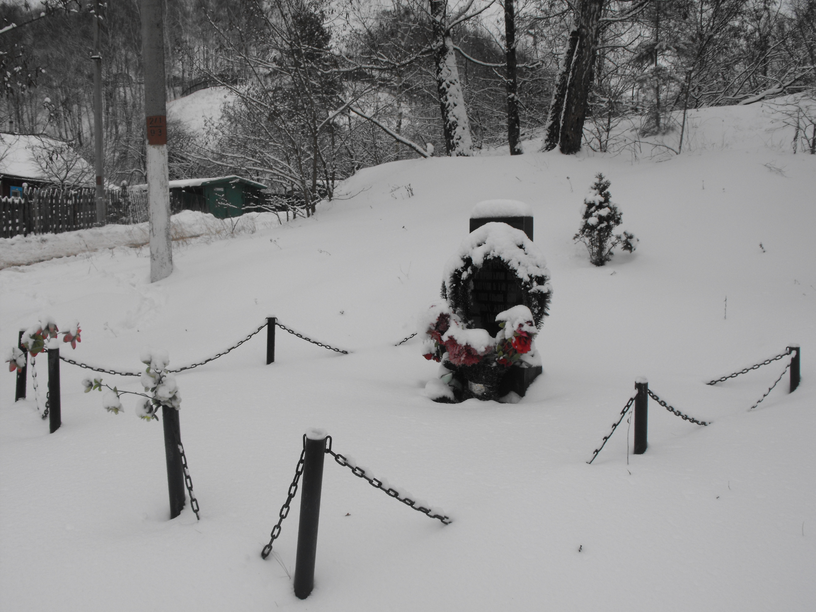 Памятник на улице 17-го сентября на месте массовых убийств мозырьских евреев в течение 1942-1943 гг.